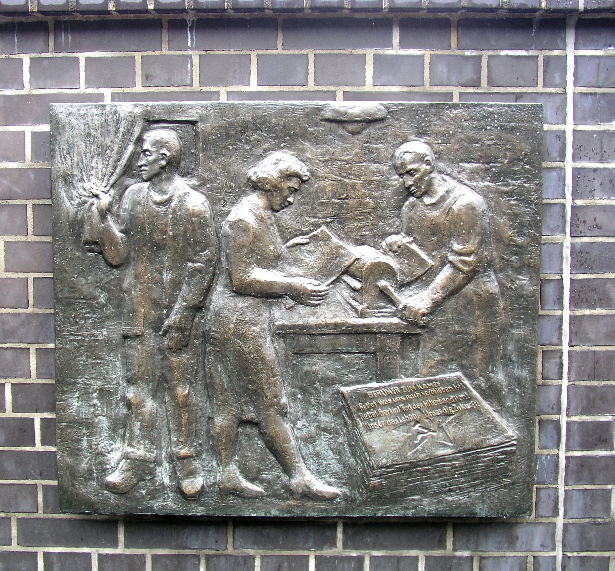 Gedenktafelserie (Teil 4) in der Schönhauser Allee, Berlin, von Günter Schütz, DDR 1985/86